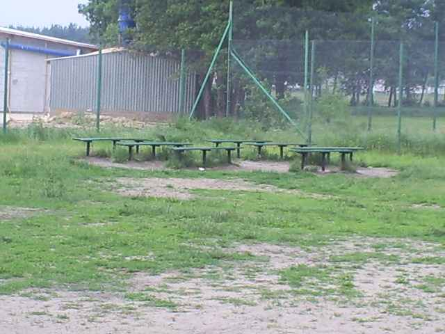 Ławki w Gimnazjum w Chrośnicy